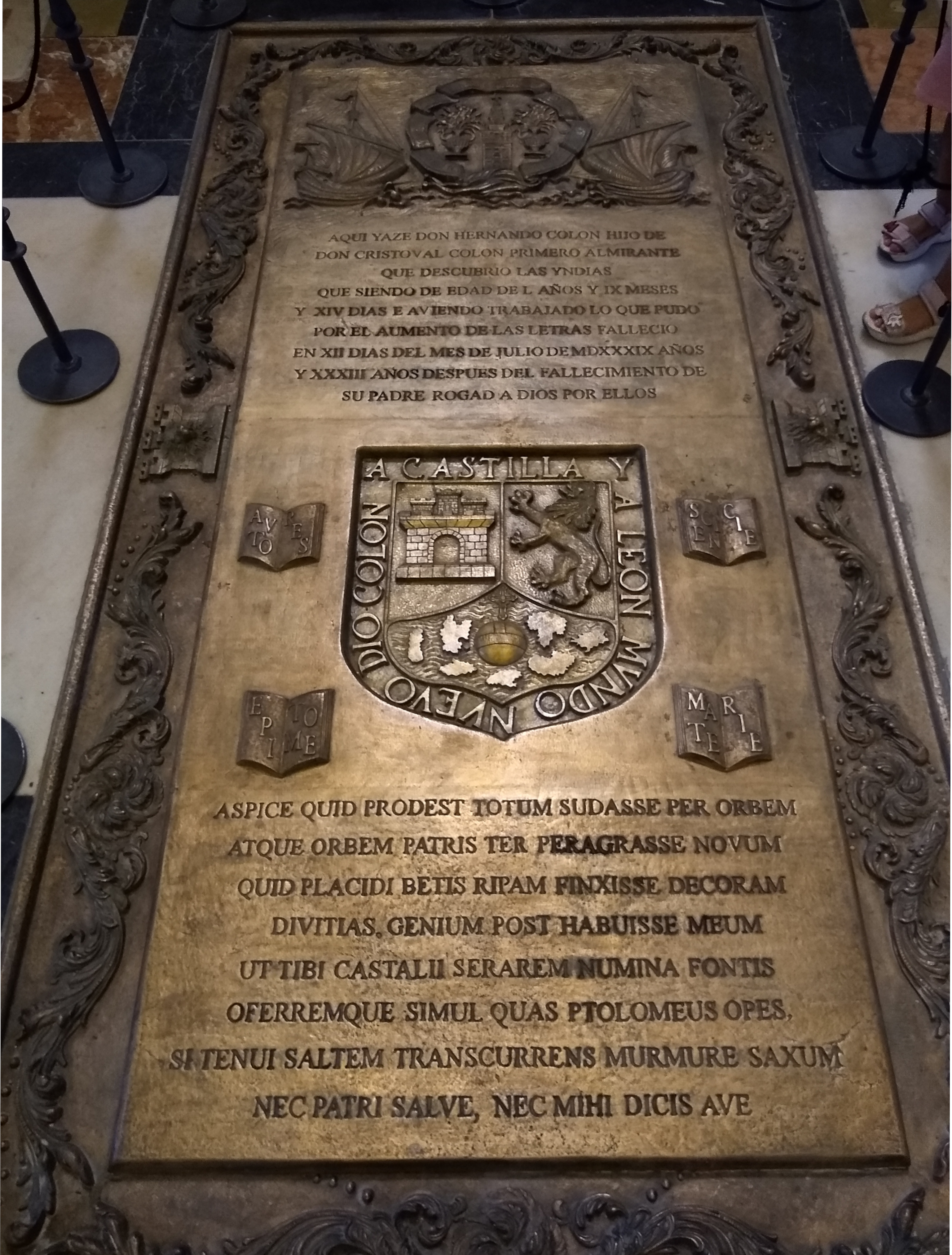 Tumba de Hernando Colón. Catedral de Sevilla. Andalucía, España.